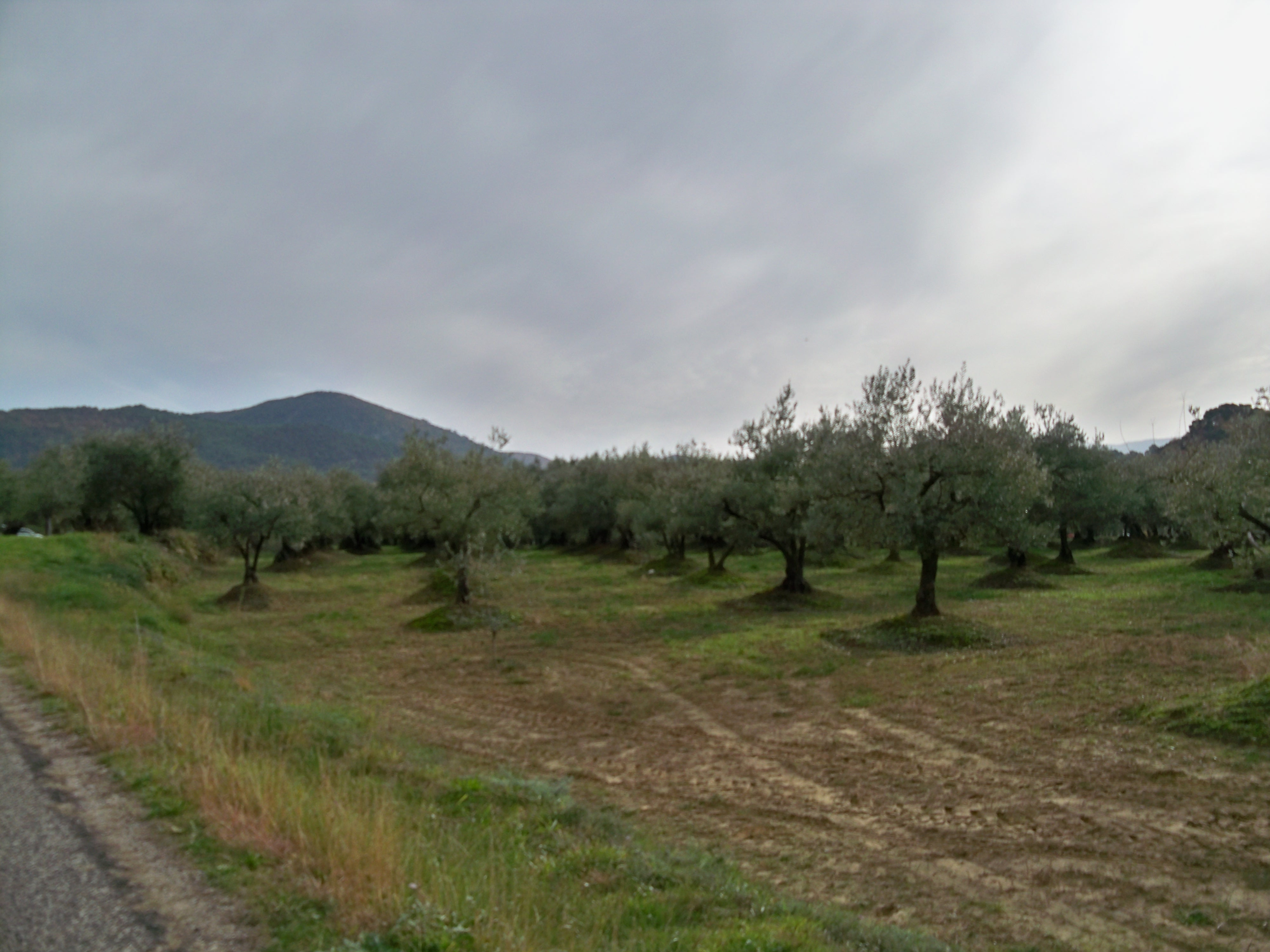 Oliviers sur la commune de Chateauneuf de Bordette